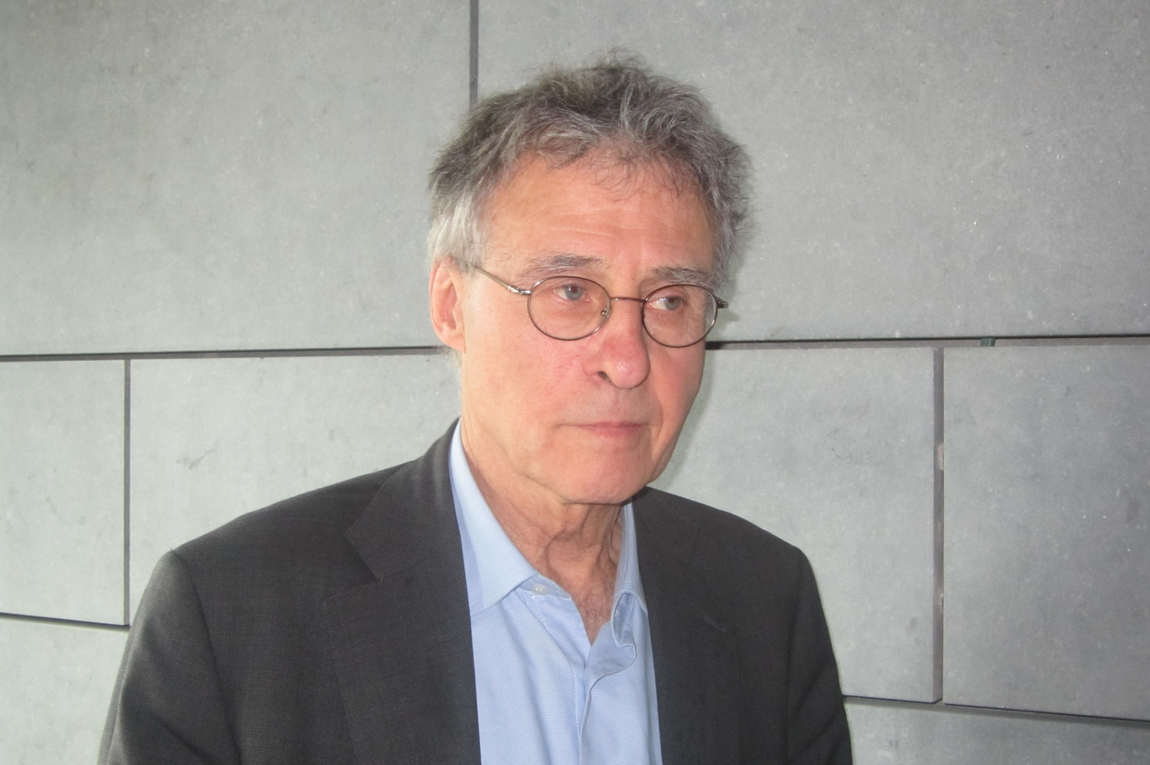 Harry Rutten, juli 2017